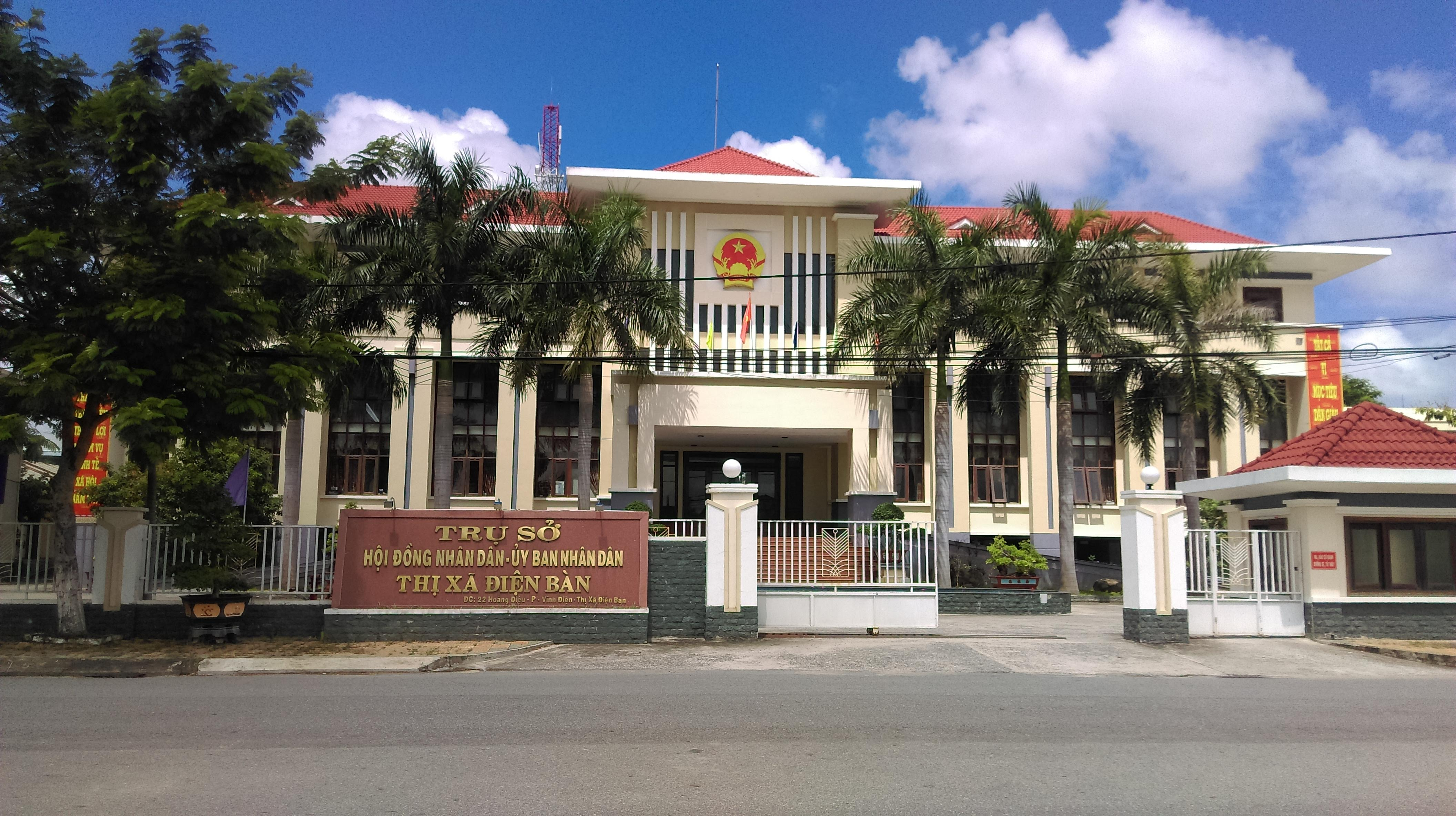 UBND Thị xã Điện Bàn, Quảng Nam